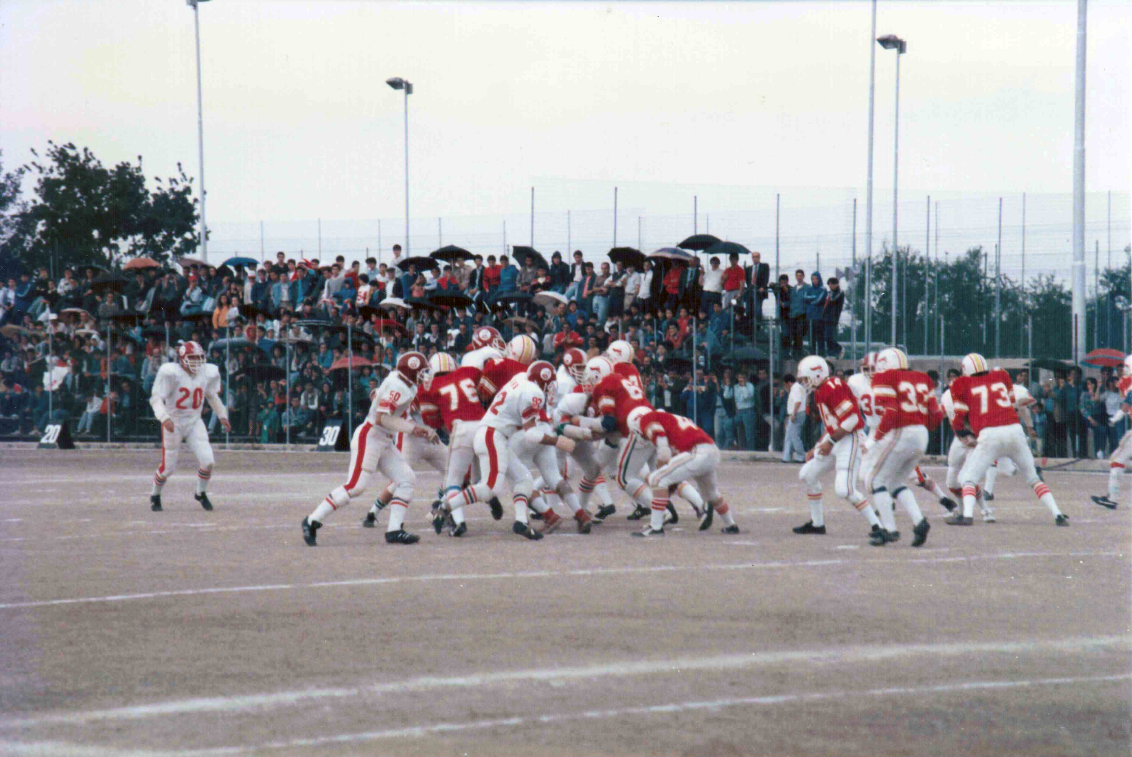 Palermo cardinals-Bari roosters nel campo Lavermicocca di Bari in partita amichevole